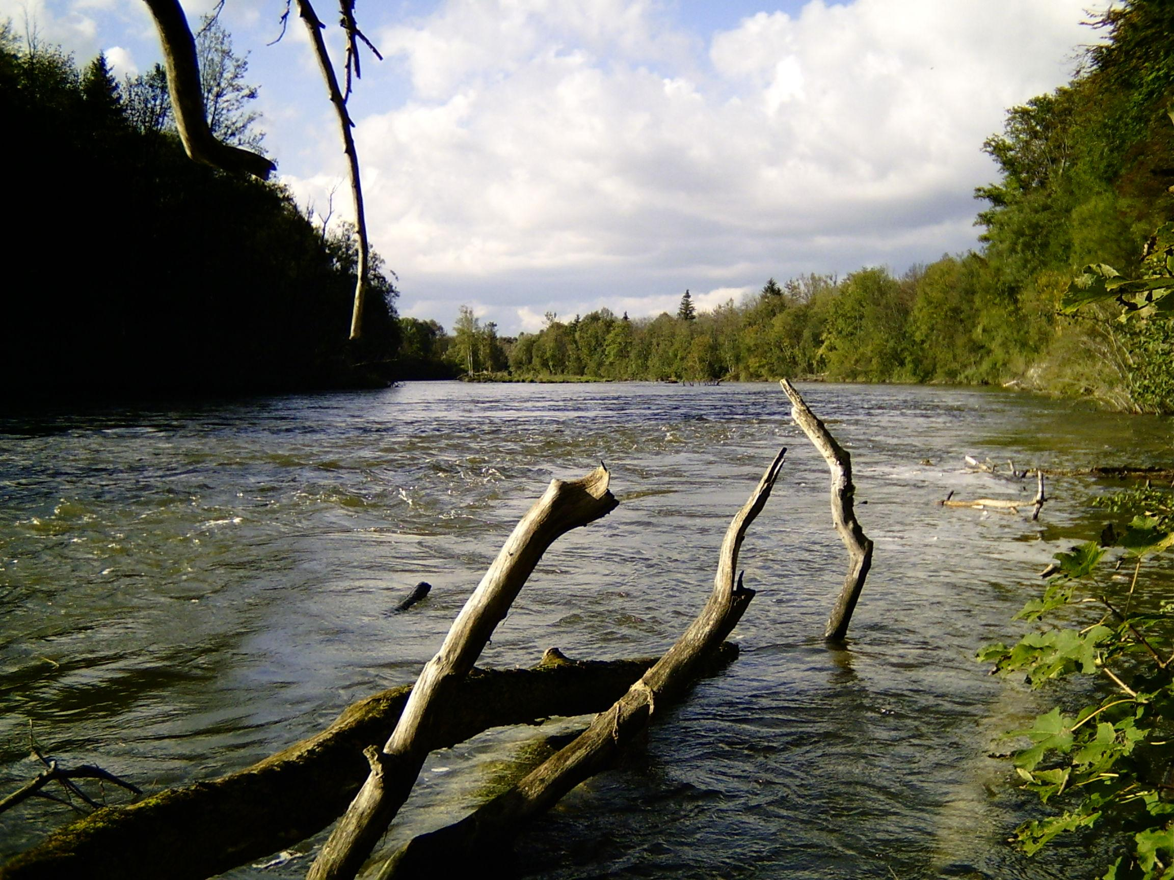 Lech zwischen Landsberg und Kaufering